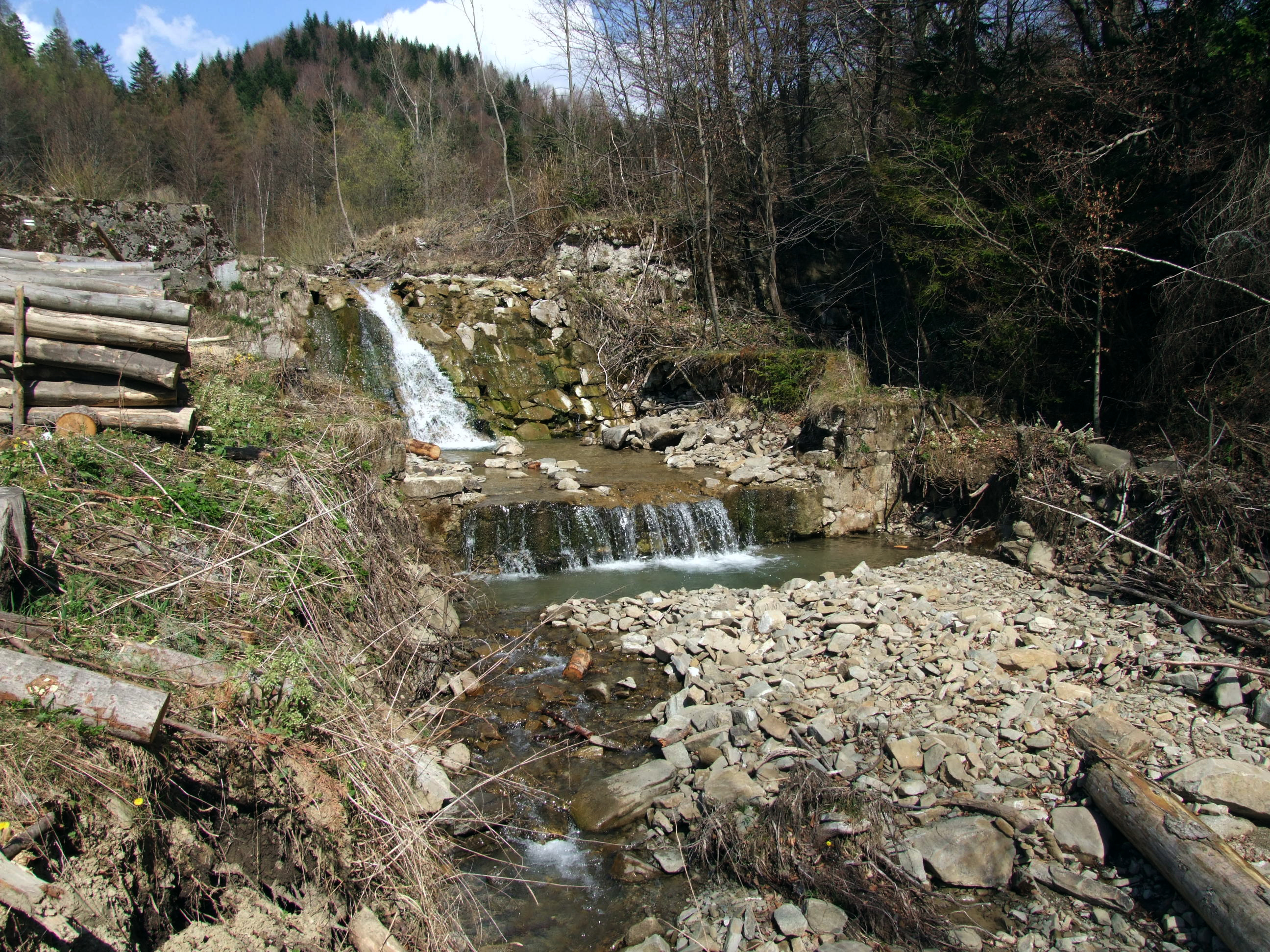 Sztuczny wodospad na Wierchomlance w środkowym biegu